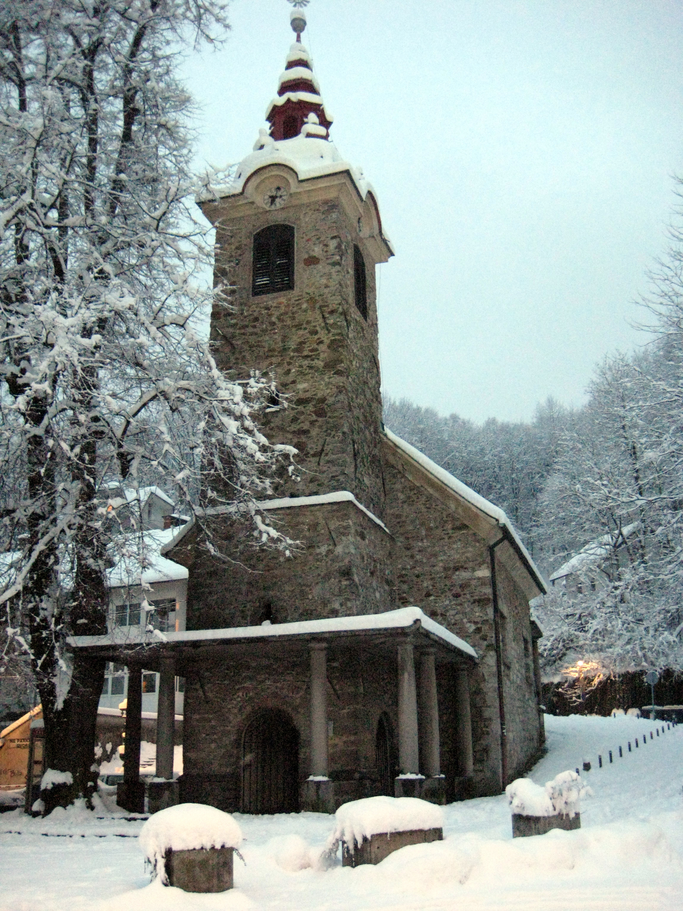 Stara cerkev